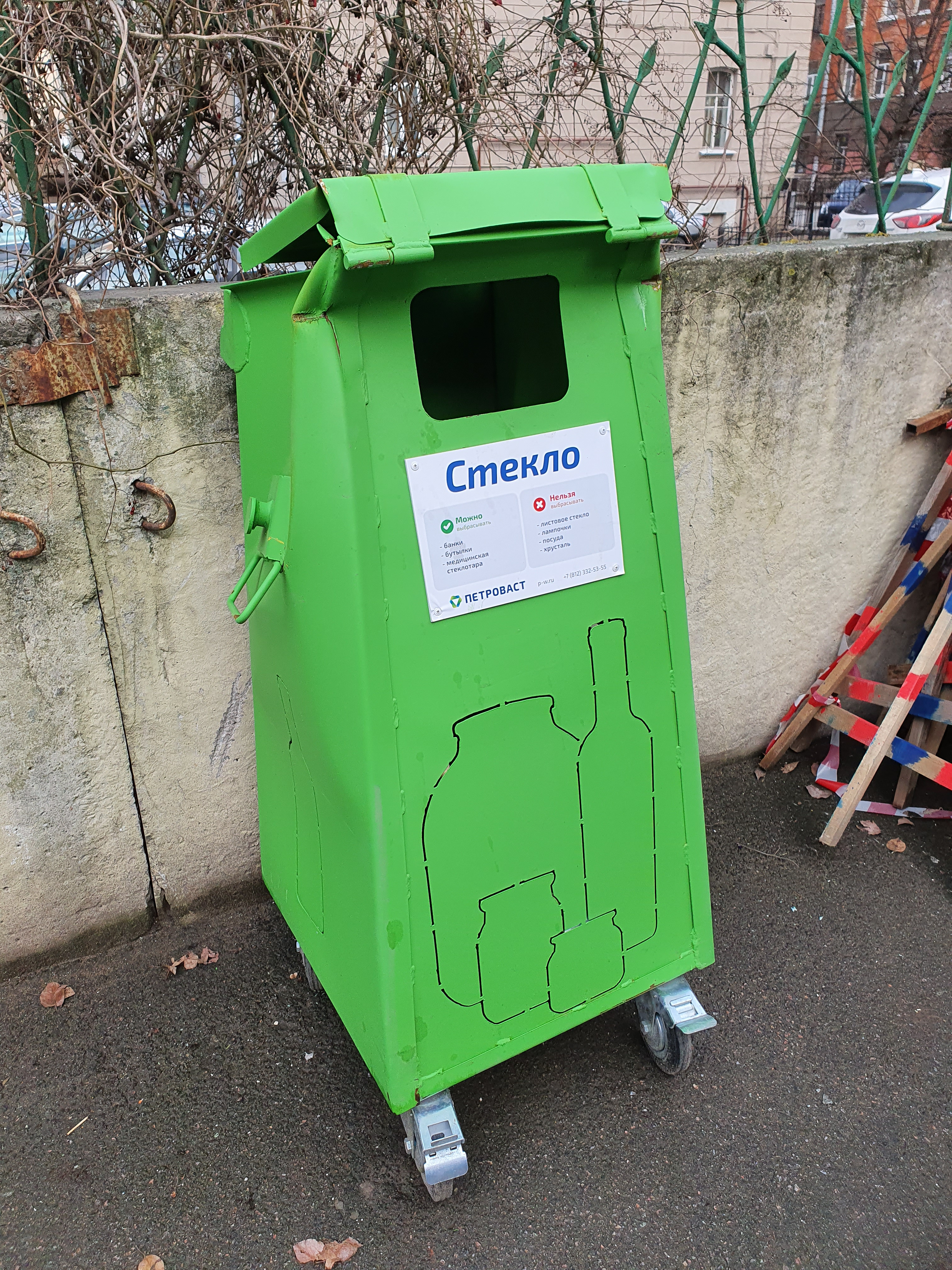 Контейнер для стекла в Петербурге